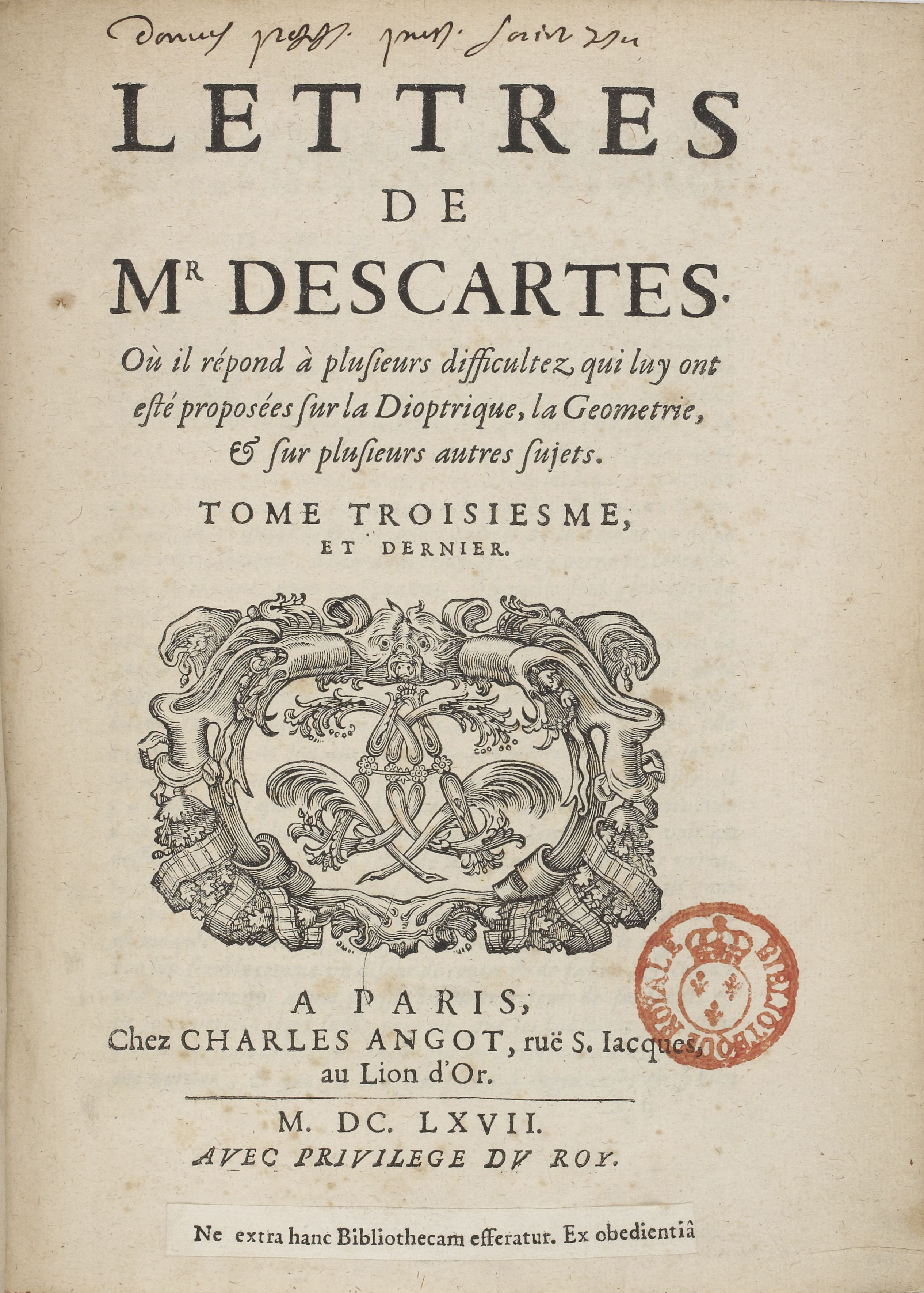 Page de titre du tome 3 de l'édition Clerselier